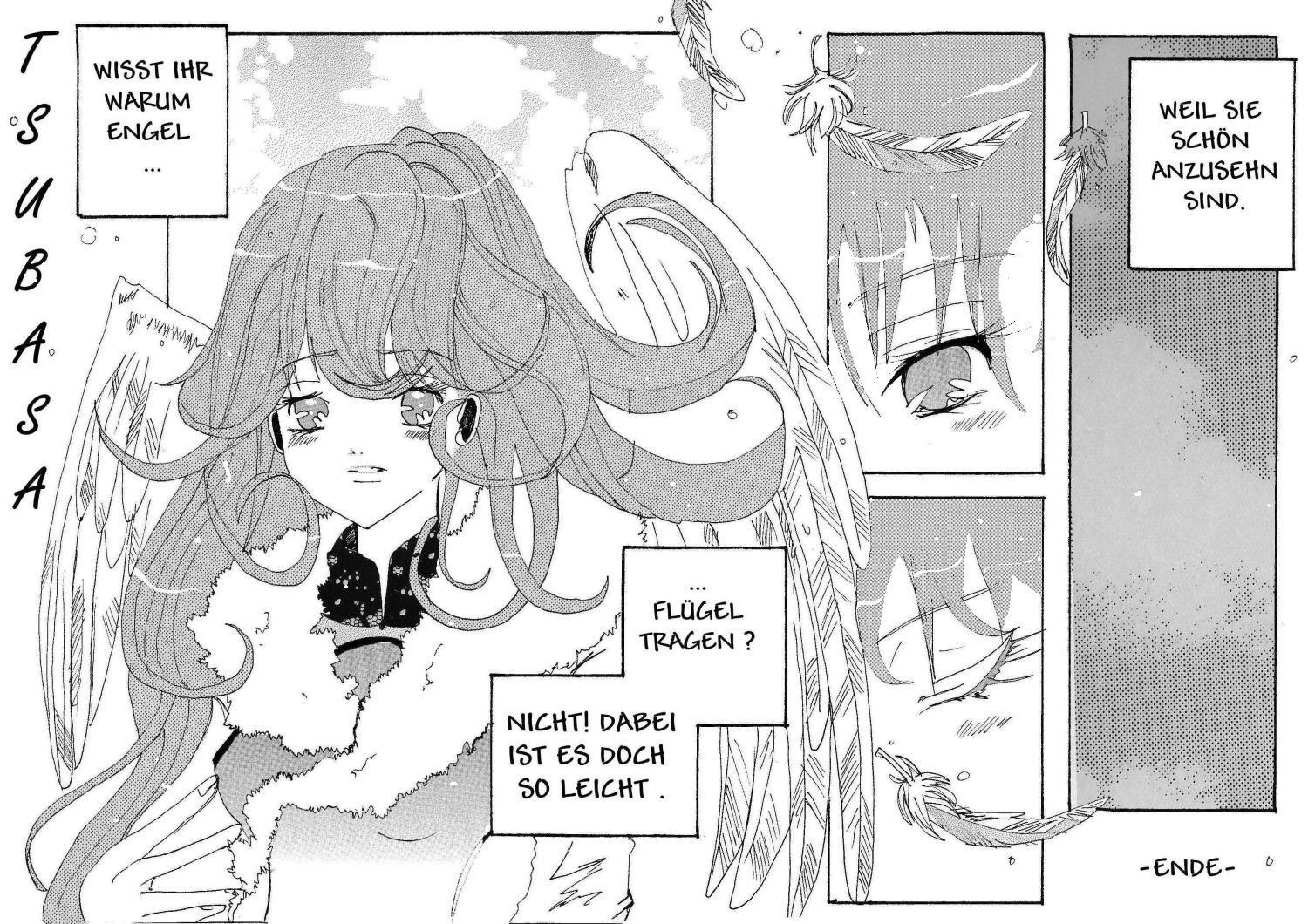 1. Platz des Wikipedia-Wettbewerbs bei Animexx in der Kategorie Erzählstruktur.